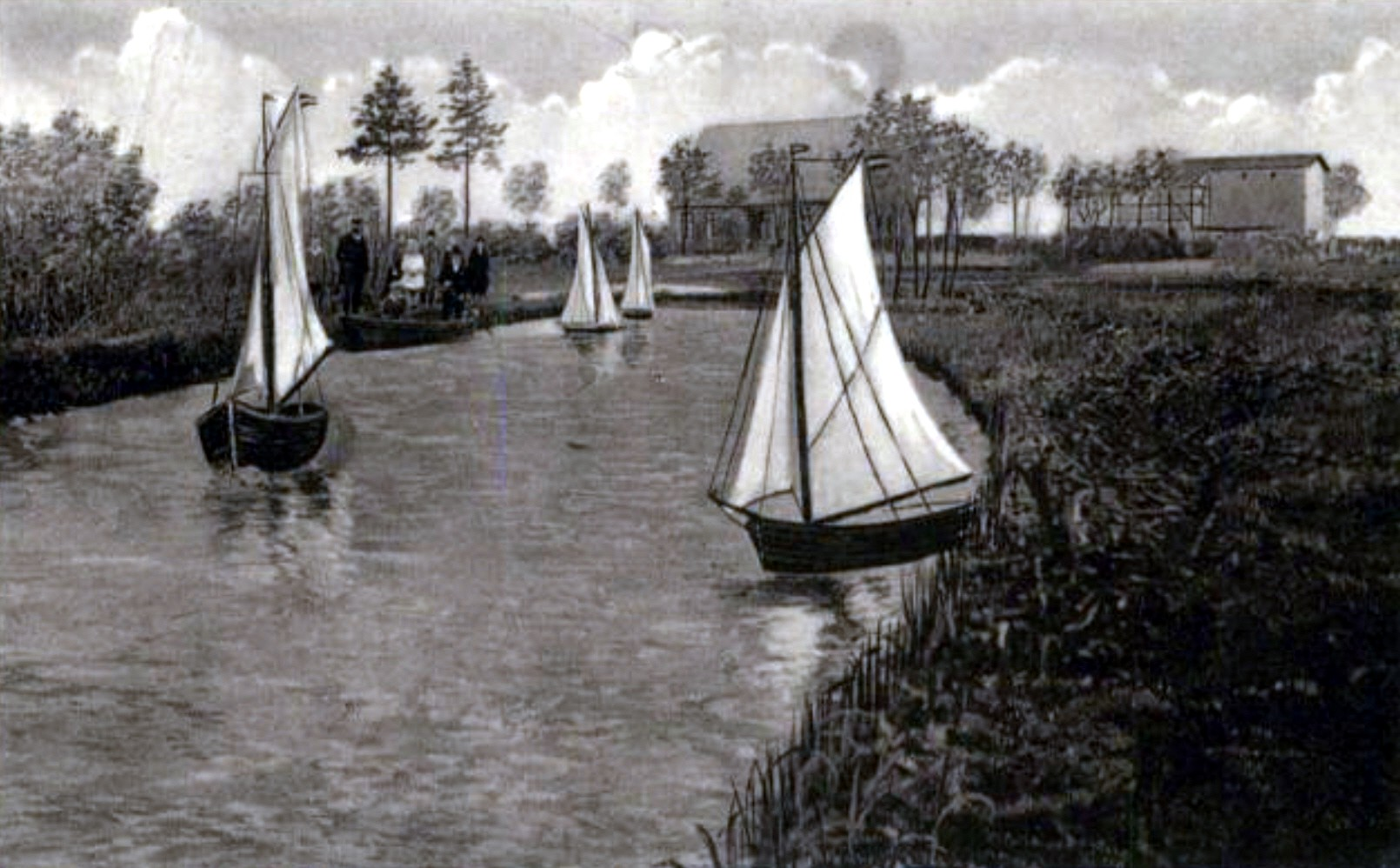 Der Wakenitzhorst Stoffershorst nahe Lübeck